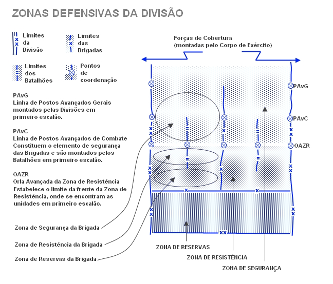 Esquema da organização defensiva de uma grande unidade.